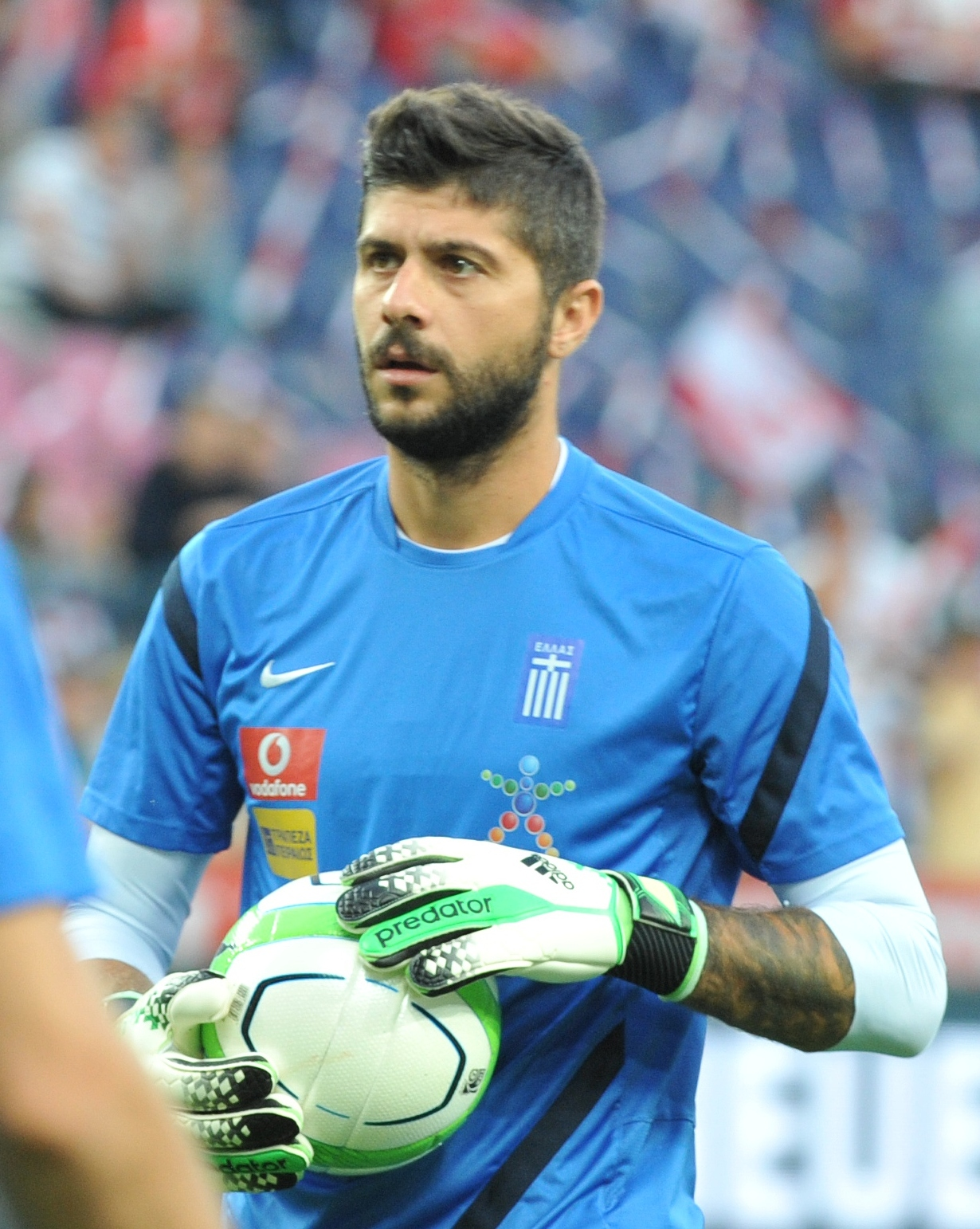 Freundschaftliches Länderspiel Österreich - Griechenland am 14. August 2013 in Salzburg: Michalis Sifakis